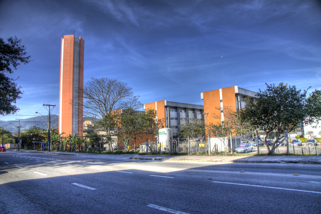 Hospital Universitário Polydoro Ernani de São Thiago, no Campus Trindade, em Florianópolis.